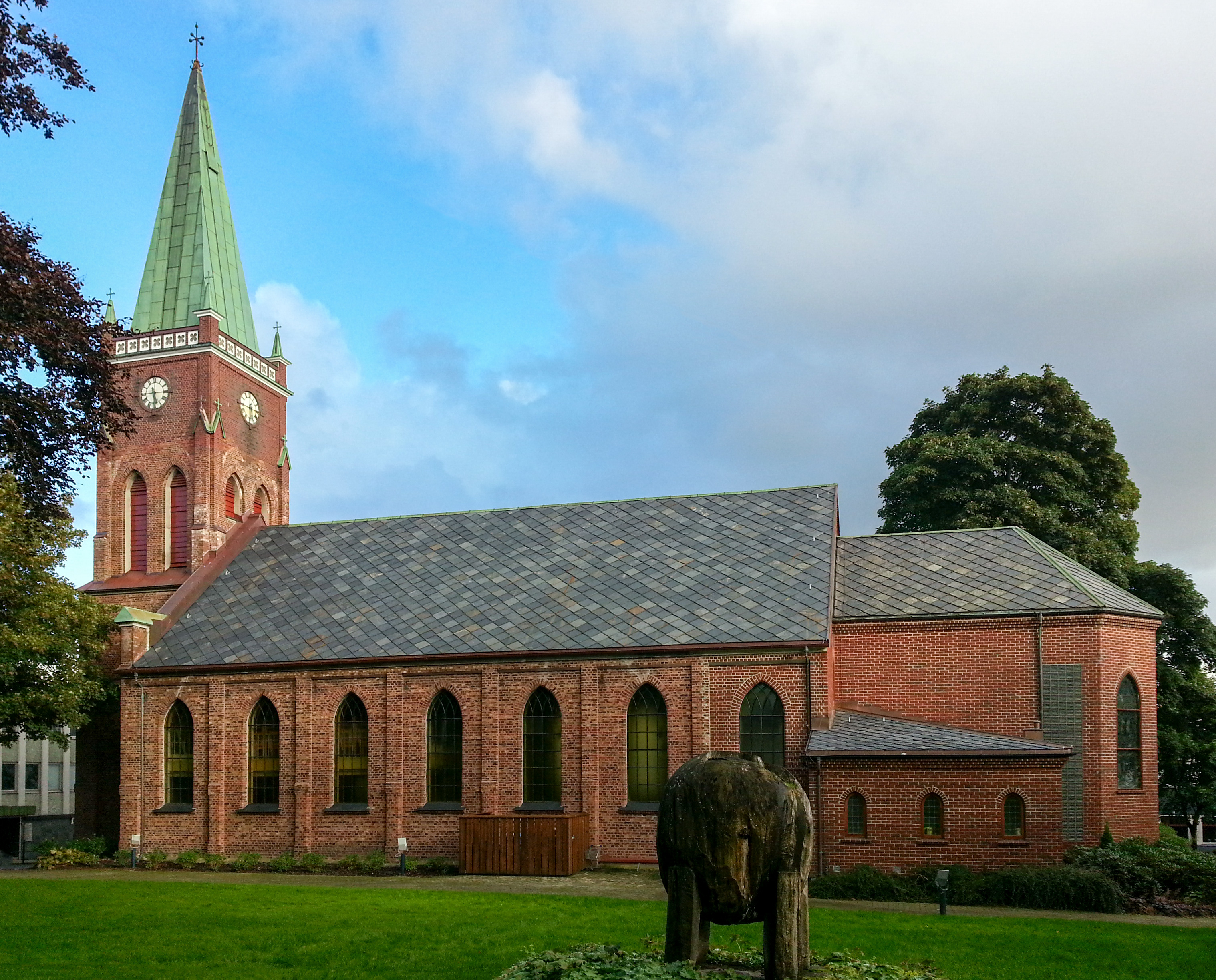 Sandnes kirkested